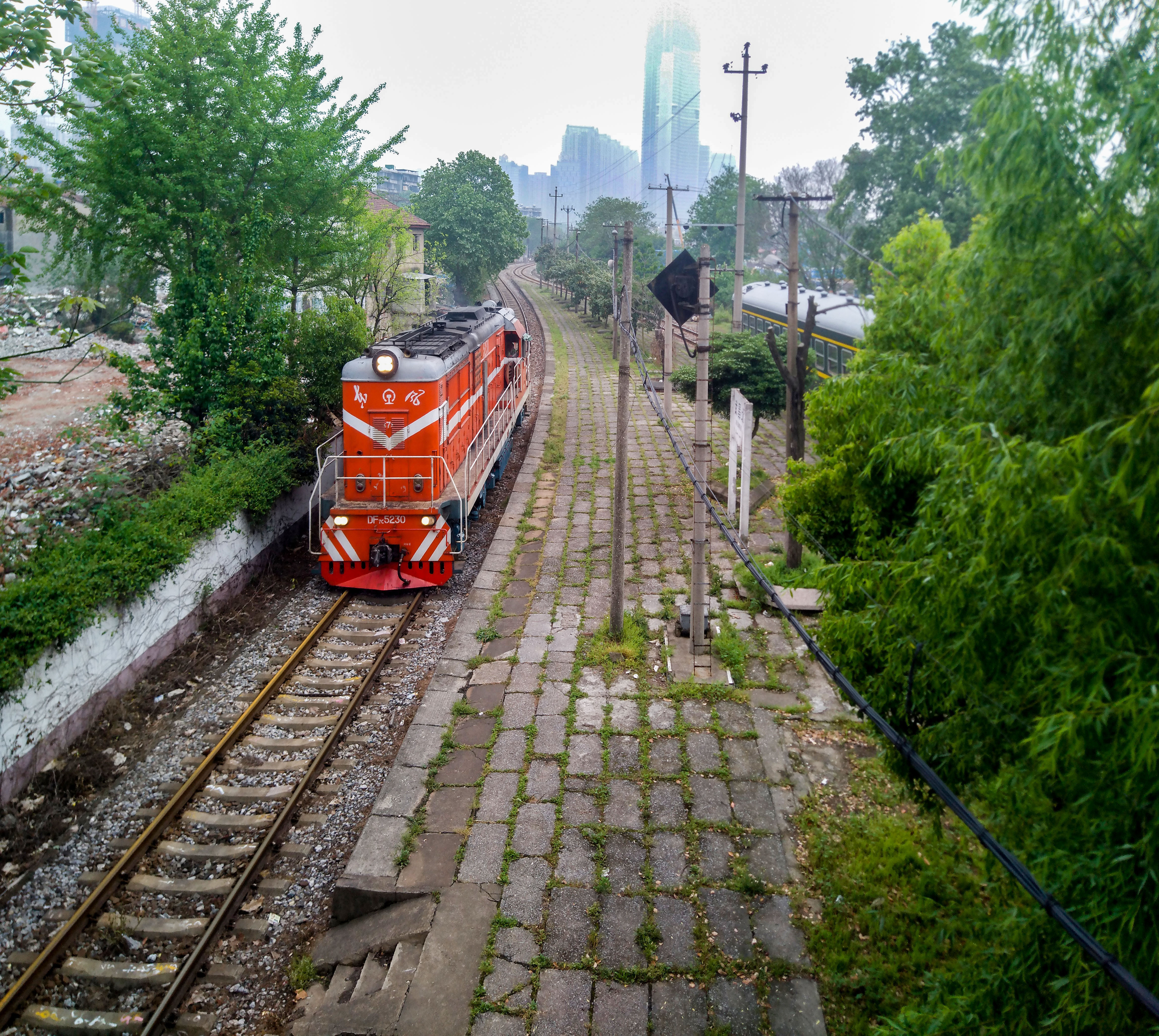 8302/3次市郊列车本务在武昌北站进行换向作业